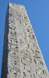 granittttt